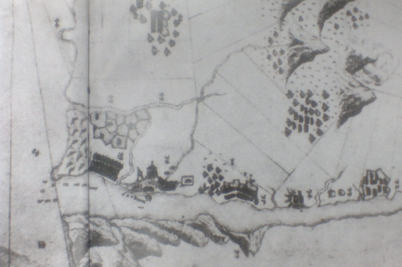 17世紀由荷蘭人所繪之淡水古地圖